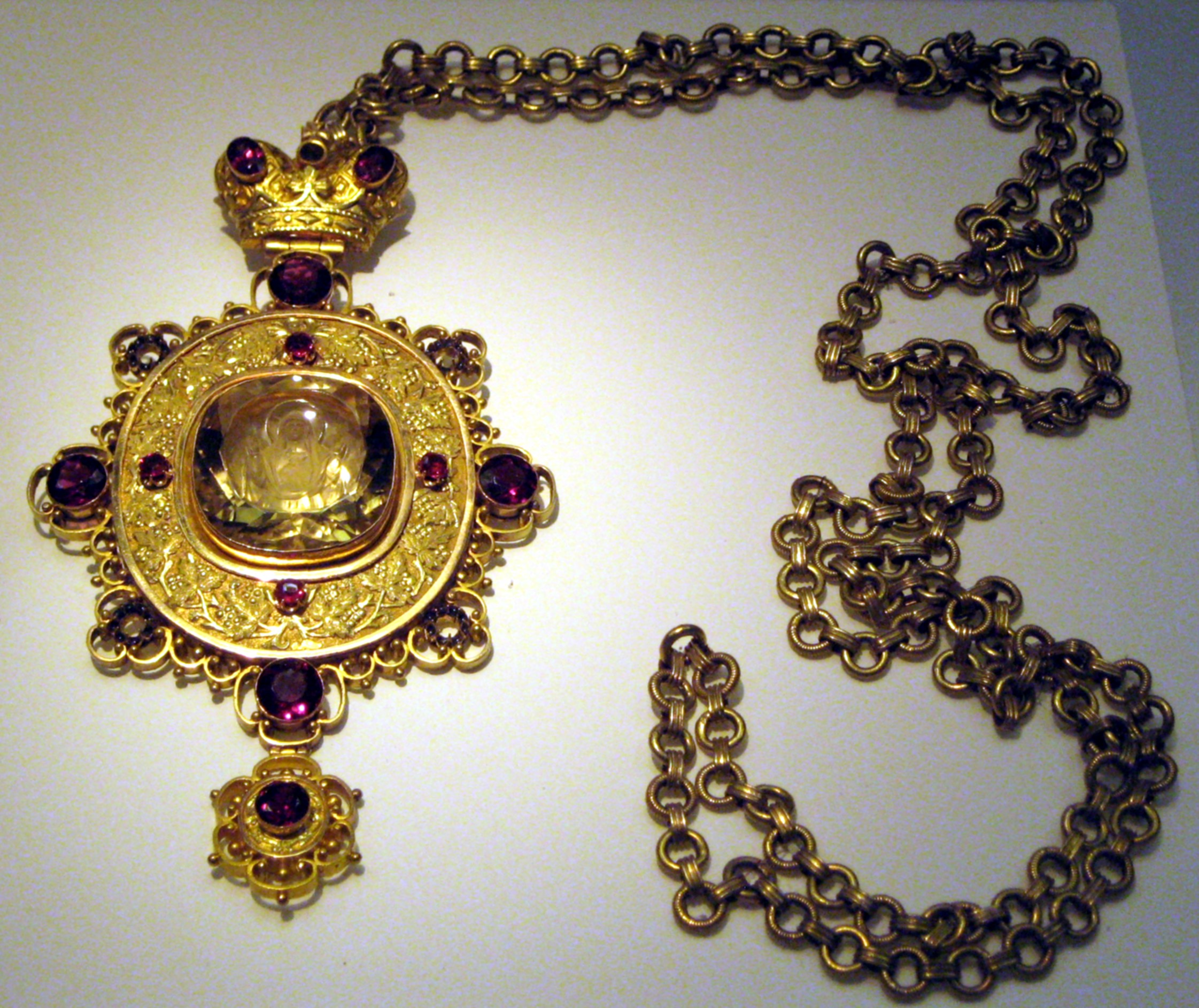 Панагия "Богоматерь Знамение", Россия, Москва, 1899. Фирма "Немиров-Колодкин". Золото, серебро, топаз, гранаты, рубины, эмаль, позолота, литье, резьба. Дар членов Николо-Ваганьковского попечительского совета о бедных епископу Тихону (будущему патриарху)/ Panagia "Oranthe"